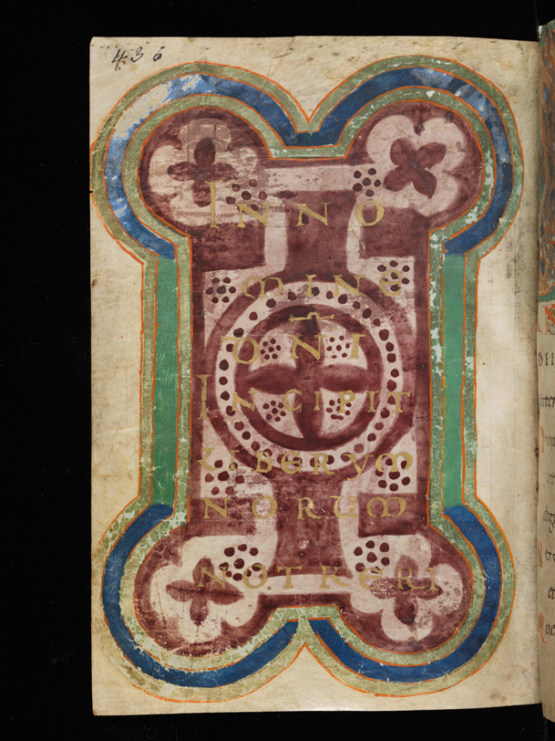 Cod. Eins. 121, Titelblatt Liber Ymnorum, S. 436